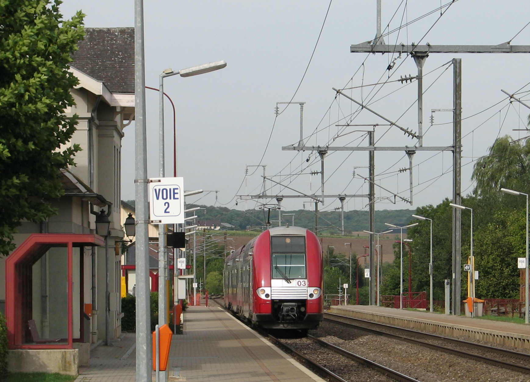 Gare vu Rued-Sir